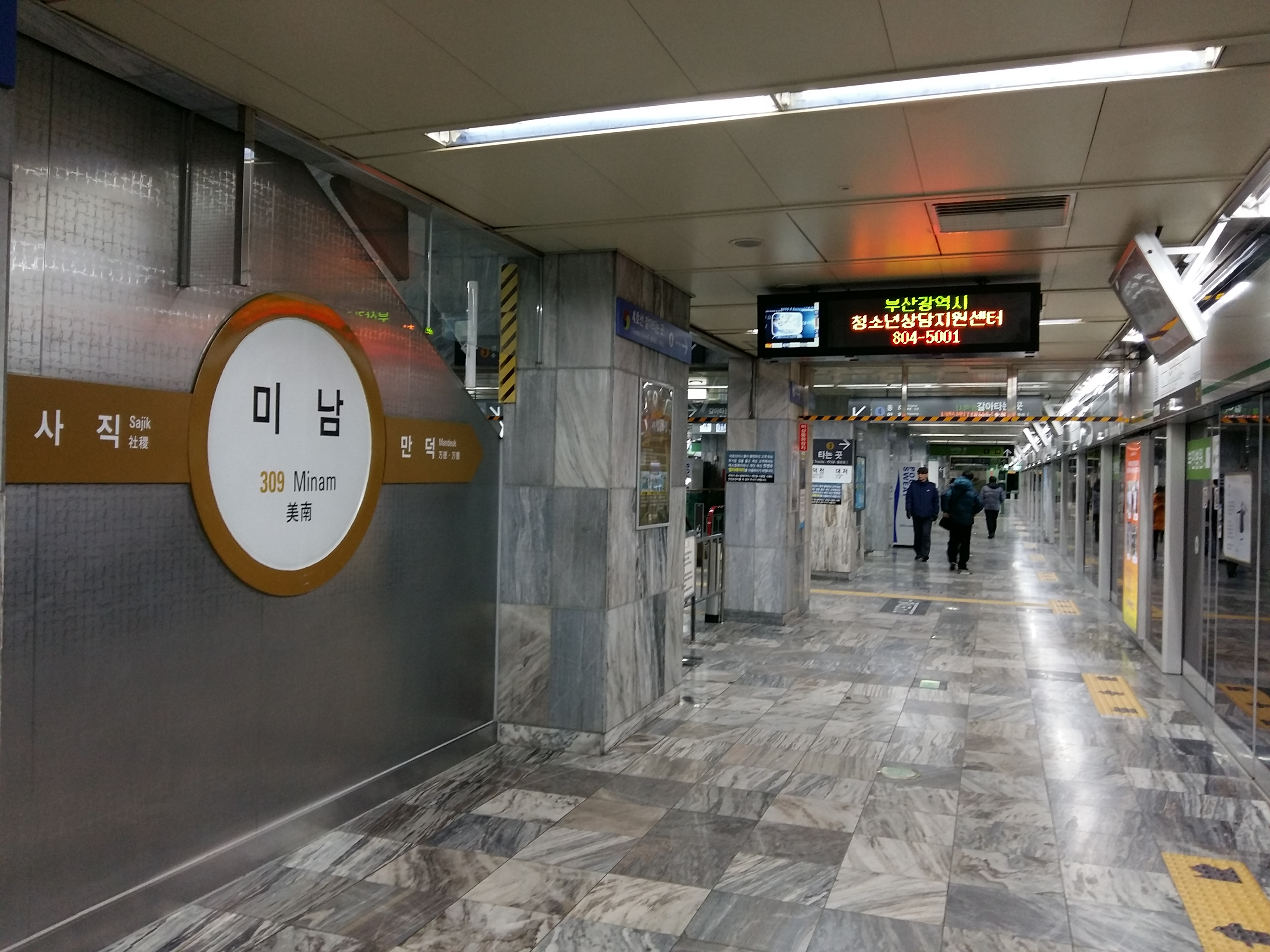 부산 도시철도 3호선 미남역